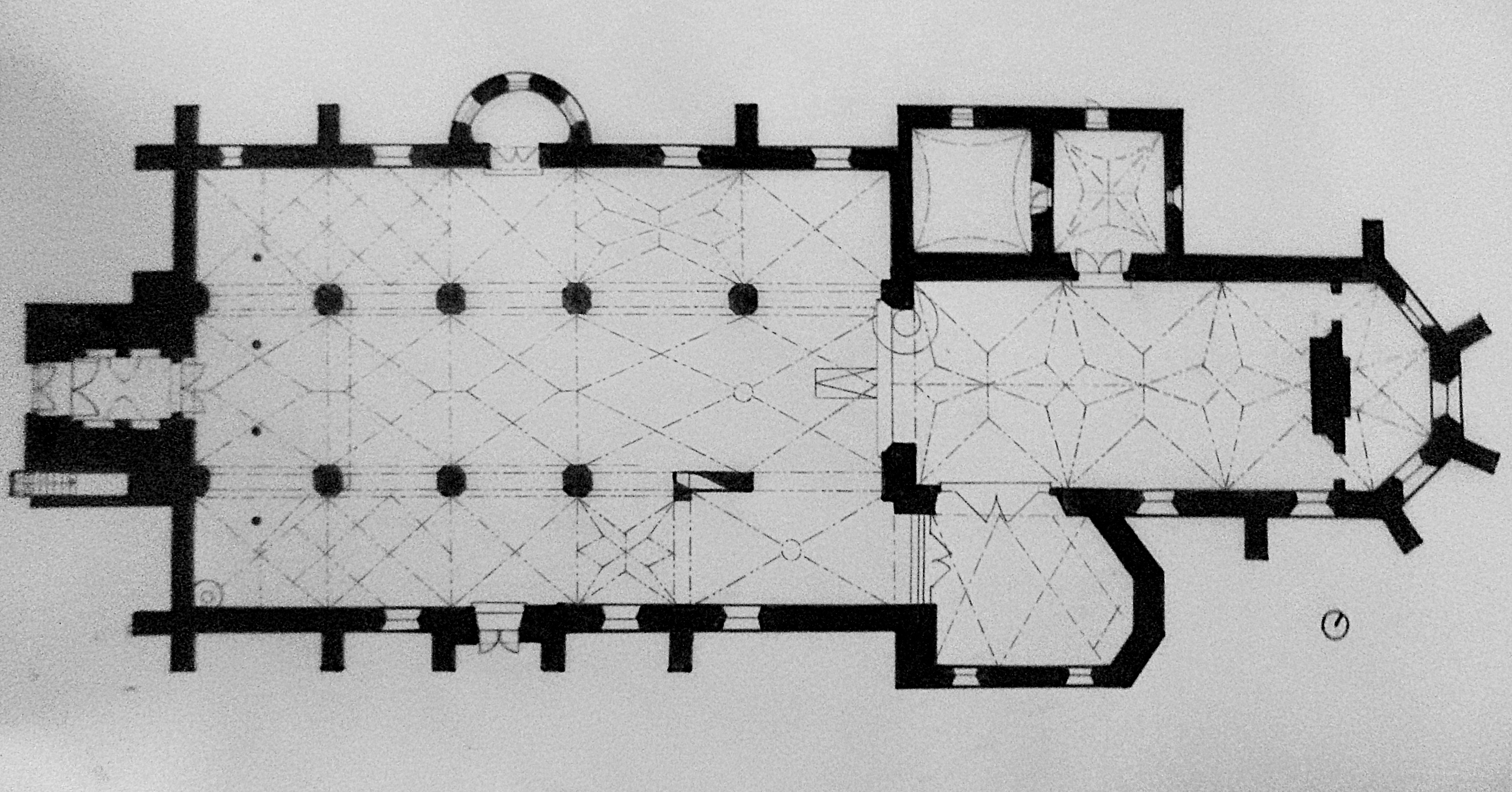 Podorys Nanebovzatej Panny Marie Pezinok